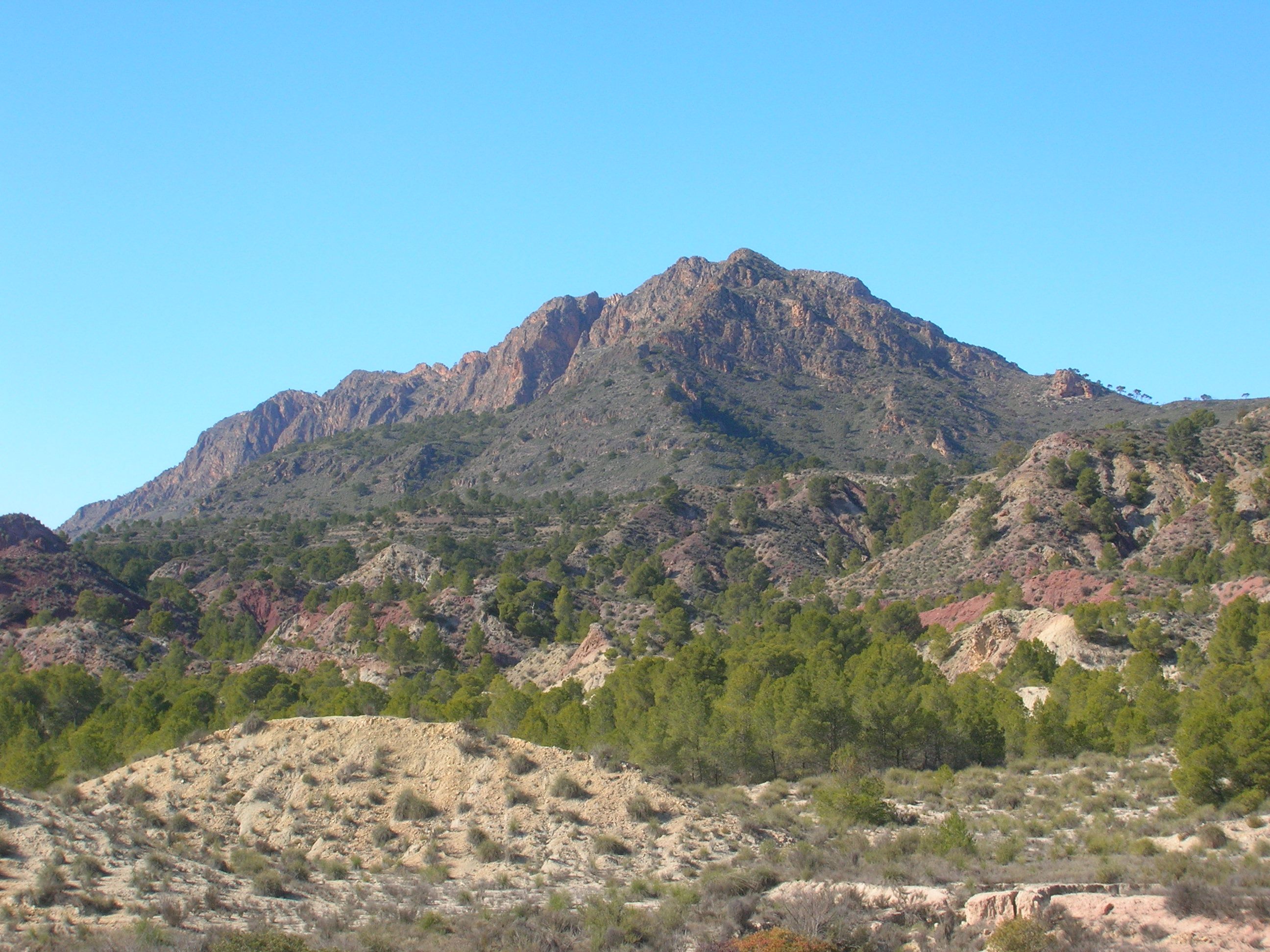 Sierra del Molino (cara SE), en Calasparra, Murcia, España, desde el embalse de Alfonso XIII, en febrero de 2006.